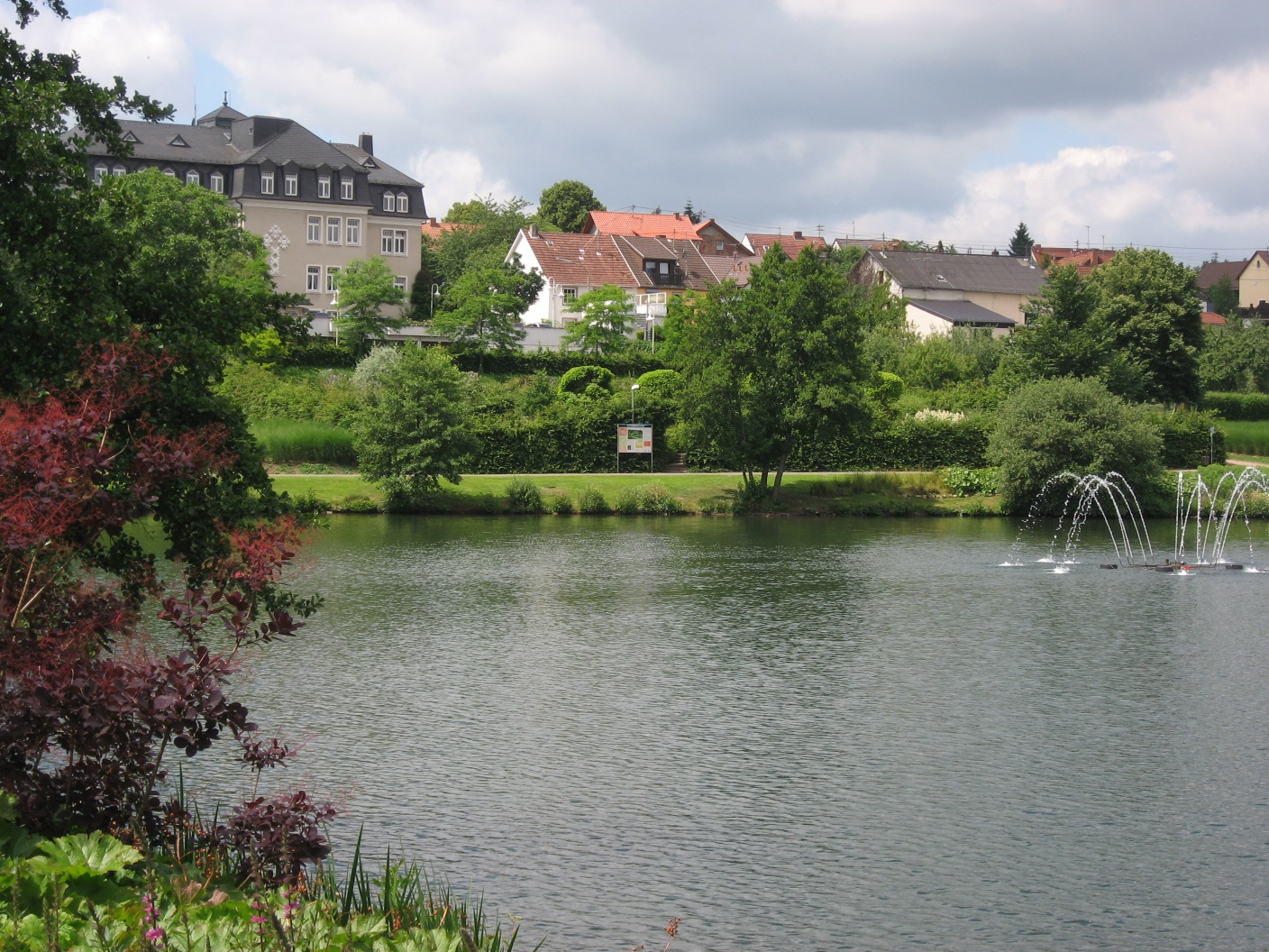 Kurpark Weiskirchen. Blick auf das Rathaus